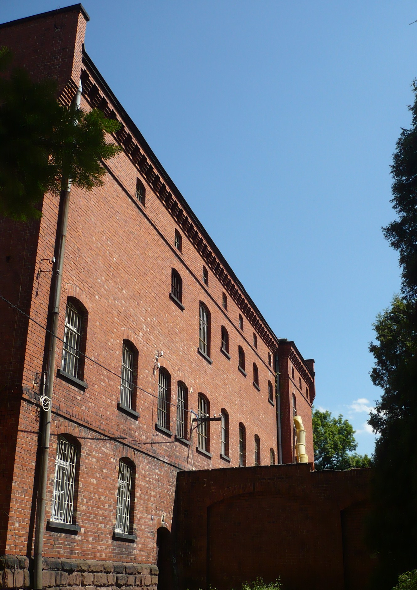 Nowa Ruda, ul. Bohaterów Getta 29 - pierwotnie sąd, obecnie komisariat policji, 1887-1889